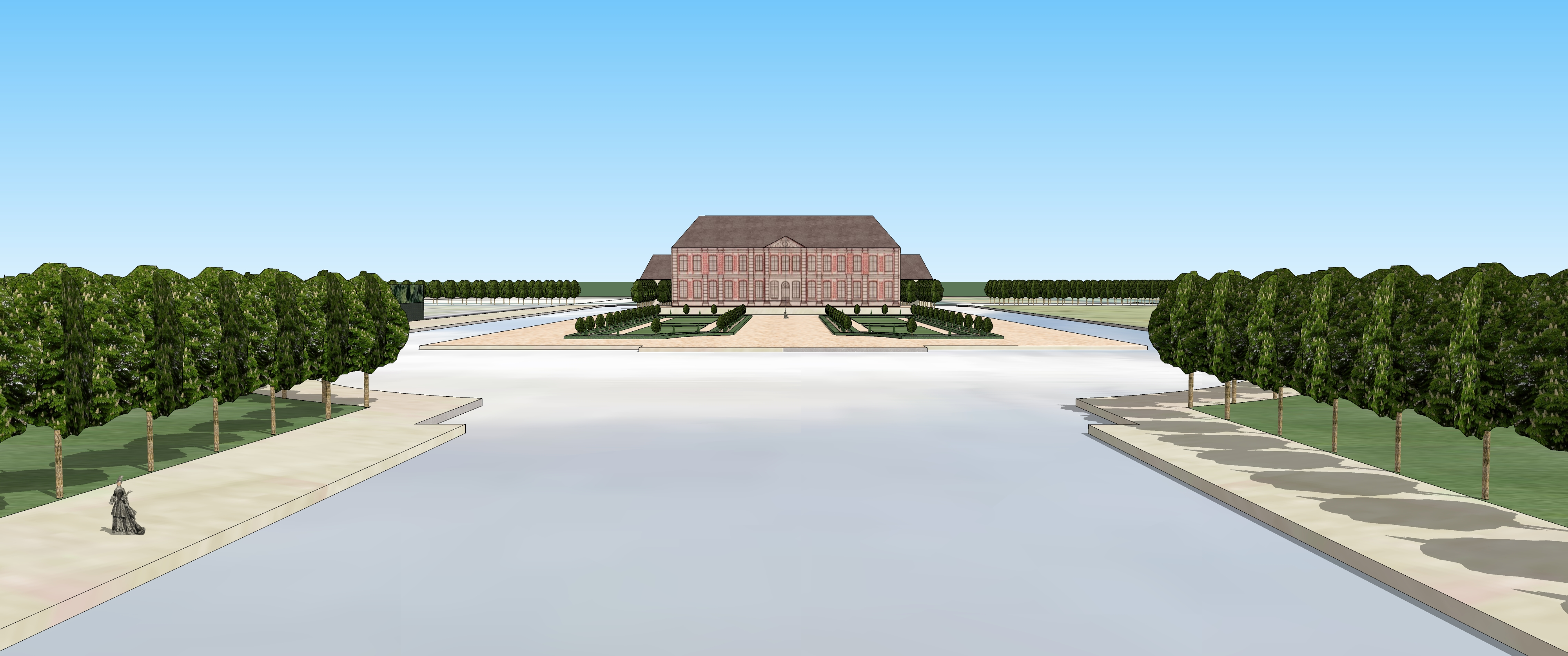 Vue cavalière du château de Thorigny depuis le canal. Vers 1710.